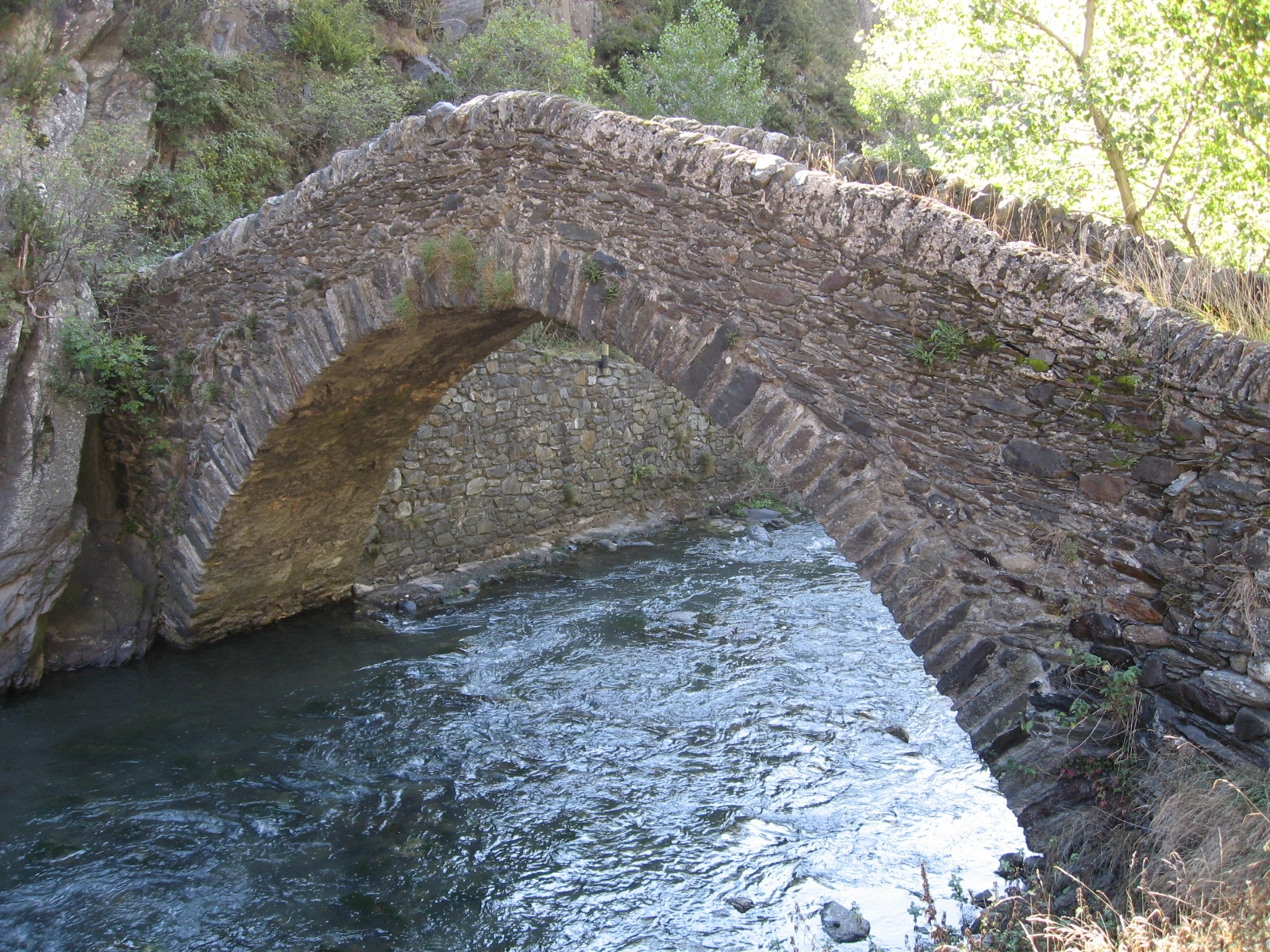 Pont de Sant Antoni de la Grella